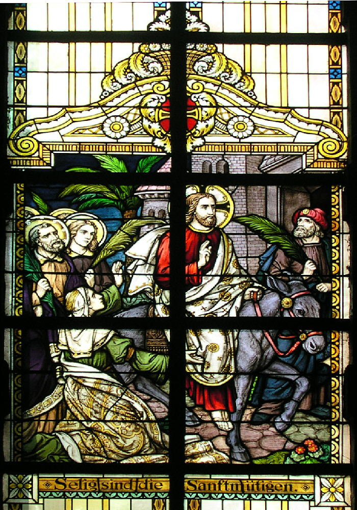 Trittenheim an der Mosel, Bleiglasfenster im Nazarenerstil (1923) in der katholischen Pfarrkirche "St. Clemens" Matthäus 5,5 Selig, die keine Gewalt anwenden; denn sie werden das Land erben. Aus den Jahren 1920/21 stammen die größtenteils noch originalen neoromanisch gehaltenen Glasfenster der Firmen Binsfeld-Dornoff (Trier; 3., 5., 7. und 8. Seligpreisung)